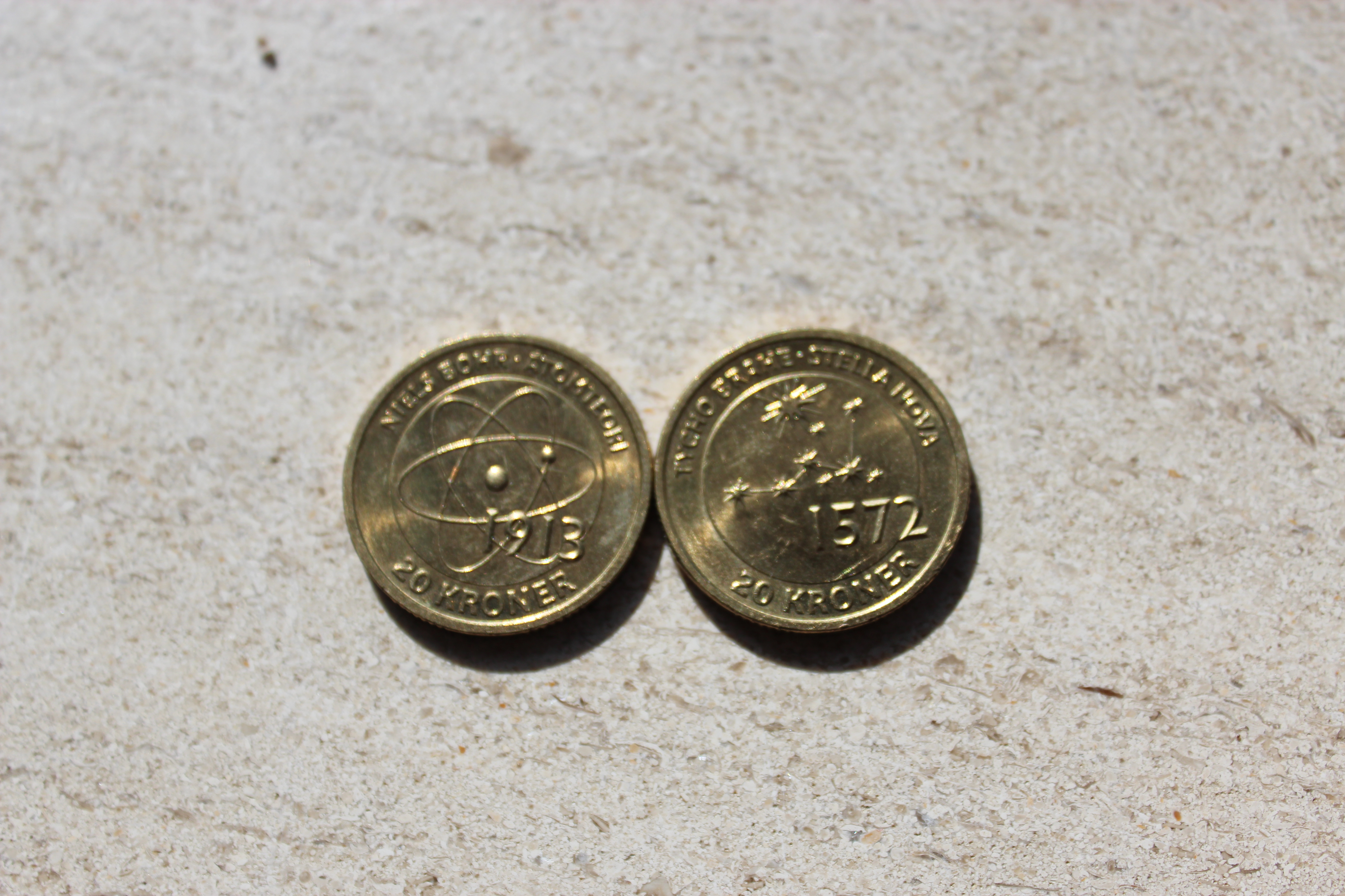 Danske 20-kroner. Temamønter med danske videnskabsmænd. Niels Bohrs Atomteori og Tycho Brahes Stella Nova.